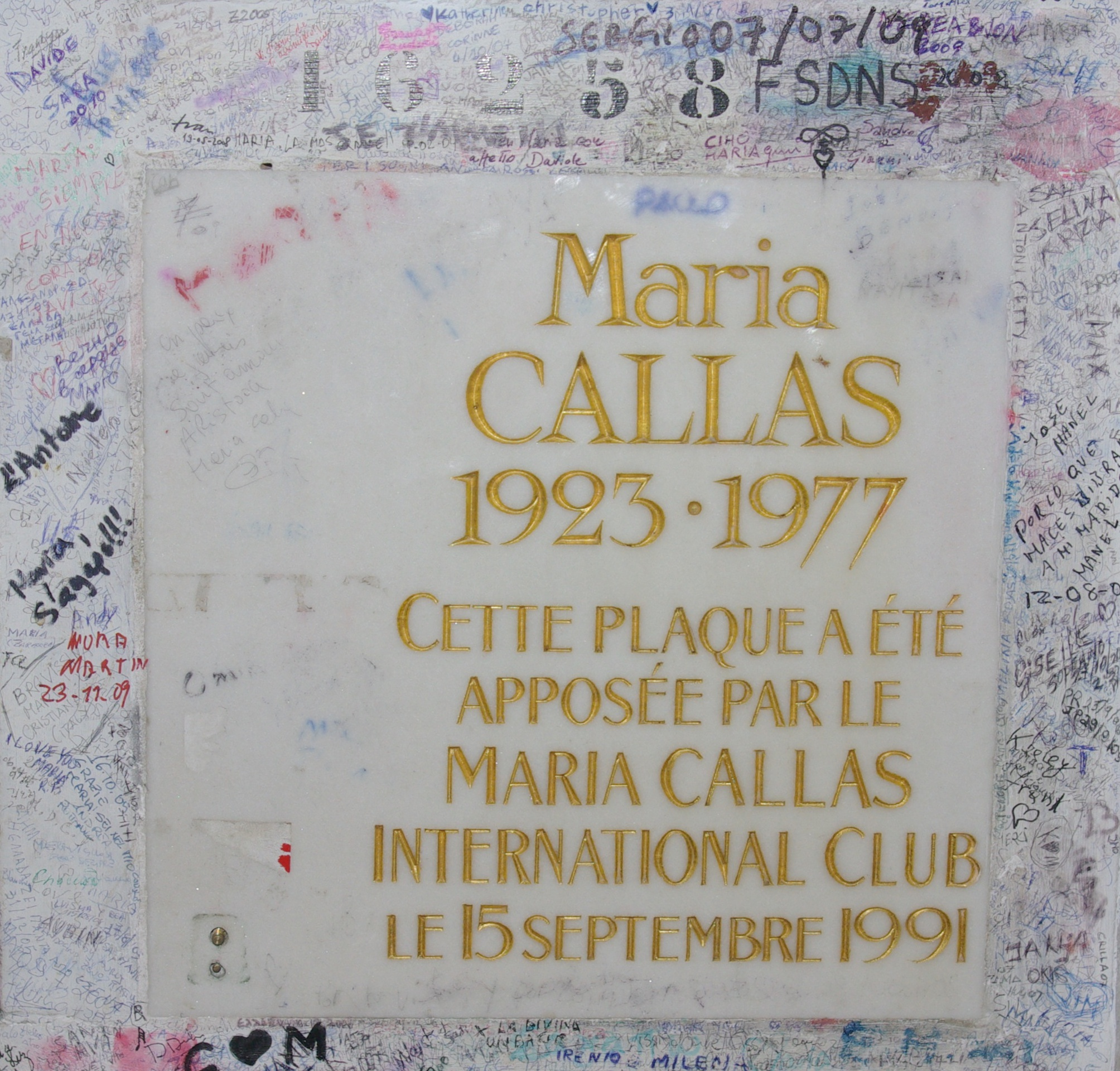 Gedenktafel für Maria Callas auf dem Friedhof Père Lachaise in Paris. Das Grab ist beschmiert und die Vase wurde entwendet.